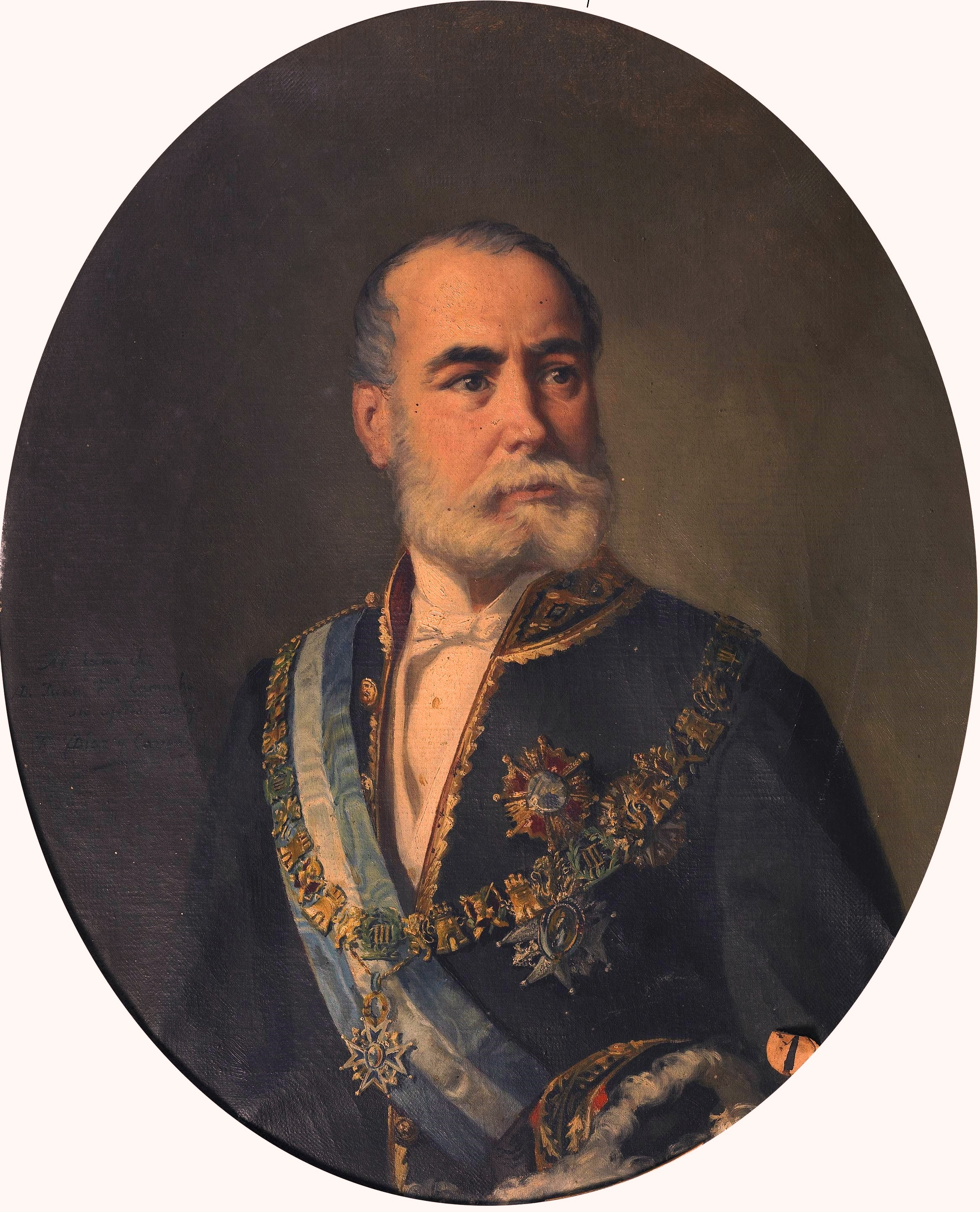 Retrato del politico español Juan Francisco Camacho de Alcorta (1813-1896), que fue ministro de Hacienda en varias ocasiones. Entre sus principales actuaciones destacan la creación el Cuerpo de Abogados del Estado, la reorganización de la Inspección de la Hacienda Pública y una ventajosa conversión de la Deuda Pública, así como la reorganización de las rentas públicas. Fue diputado en numerosas legislaturas y Senador vitalicio.